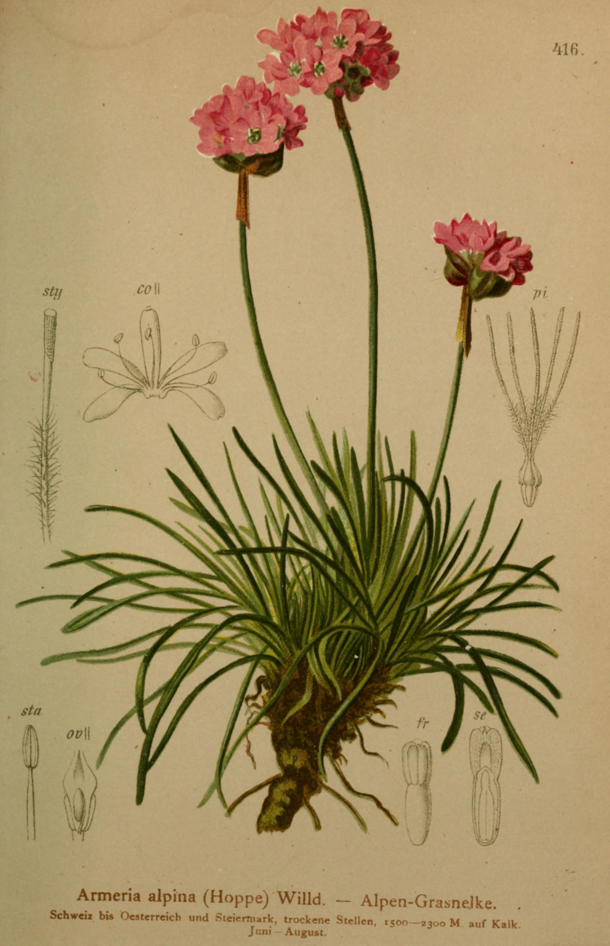 Armeria alpina (Hoppe) Willd. - Alpen-GrasneJke. Schwdi bis Ocsterreich und Stcierin»rk, trockene Stellen, .500-2300 M auf Kalk Juni August.